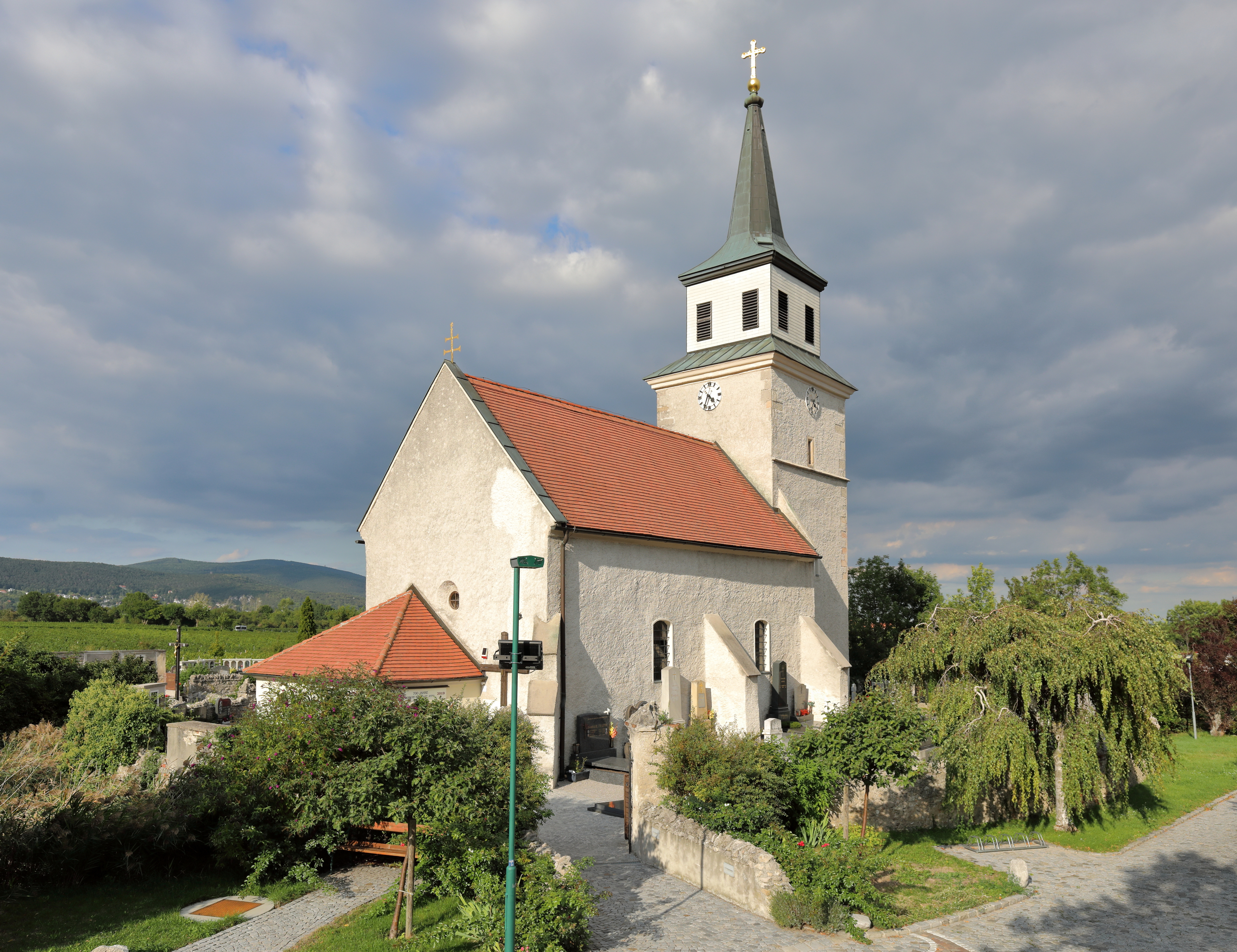 Südwestansicht der röm.-kath. Pfarrkirche hl. Anna in der niederösterreichischen Marktgemeinde Sooß.Die spätgotische Chorturmkirche wurde im 15. Jahrhundert errichtet und zur Barockzeit verändert. Sie befindet sich im Norden des Ortes auf freiem Feld, inmitten des ummauerten, im Norden, Osten und Westen von einem Graben umgebenen Friedhofs.